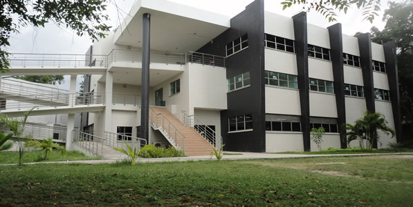 También conocida como sede ciencias de la salud.